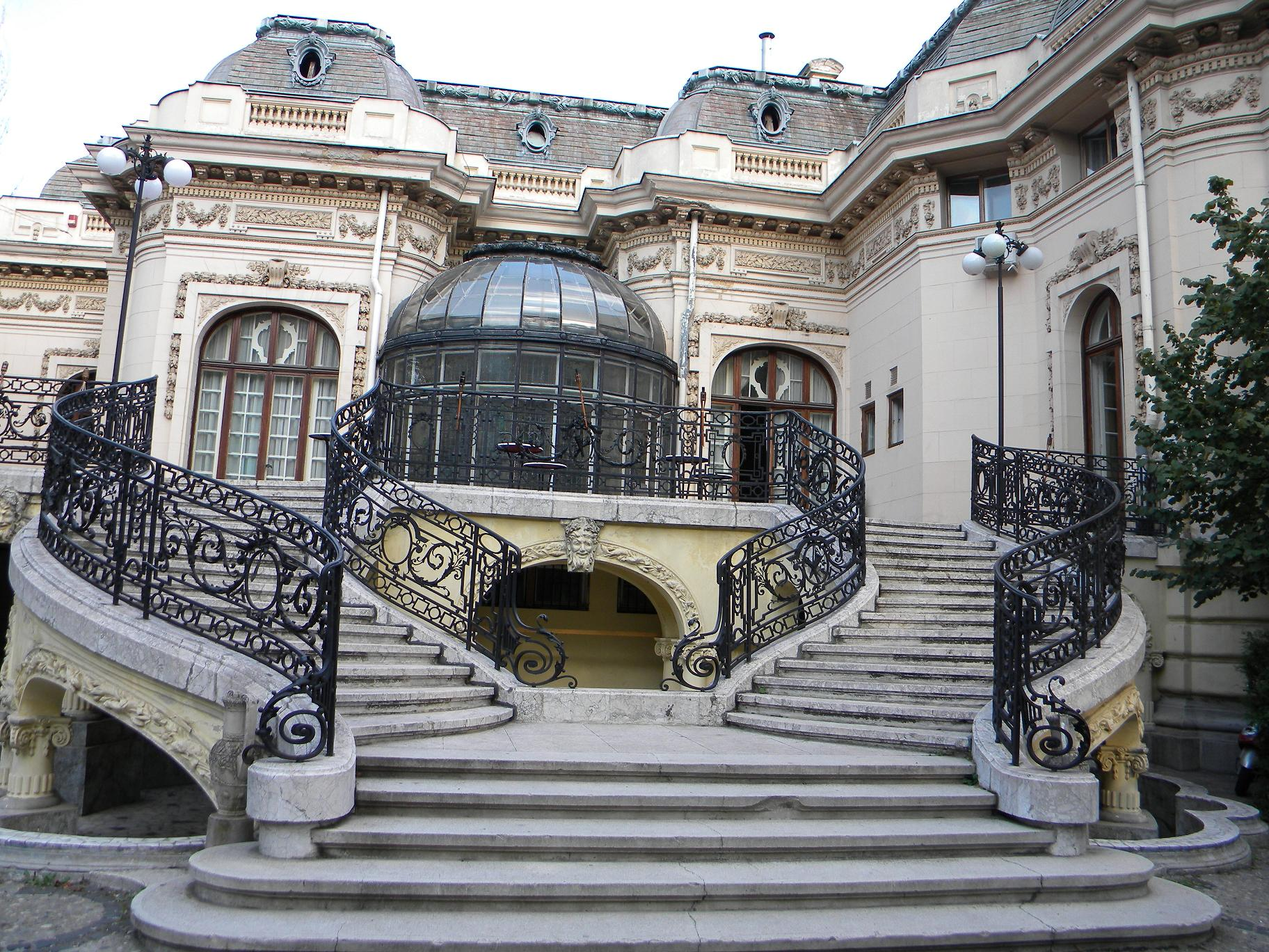 Casa Oamenilor de Stiinta (Casa Assan) este situata in Piata Alexandru Lahovary, sector 1, Bucuresti